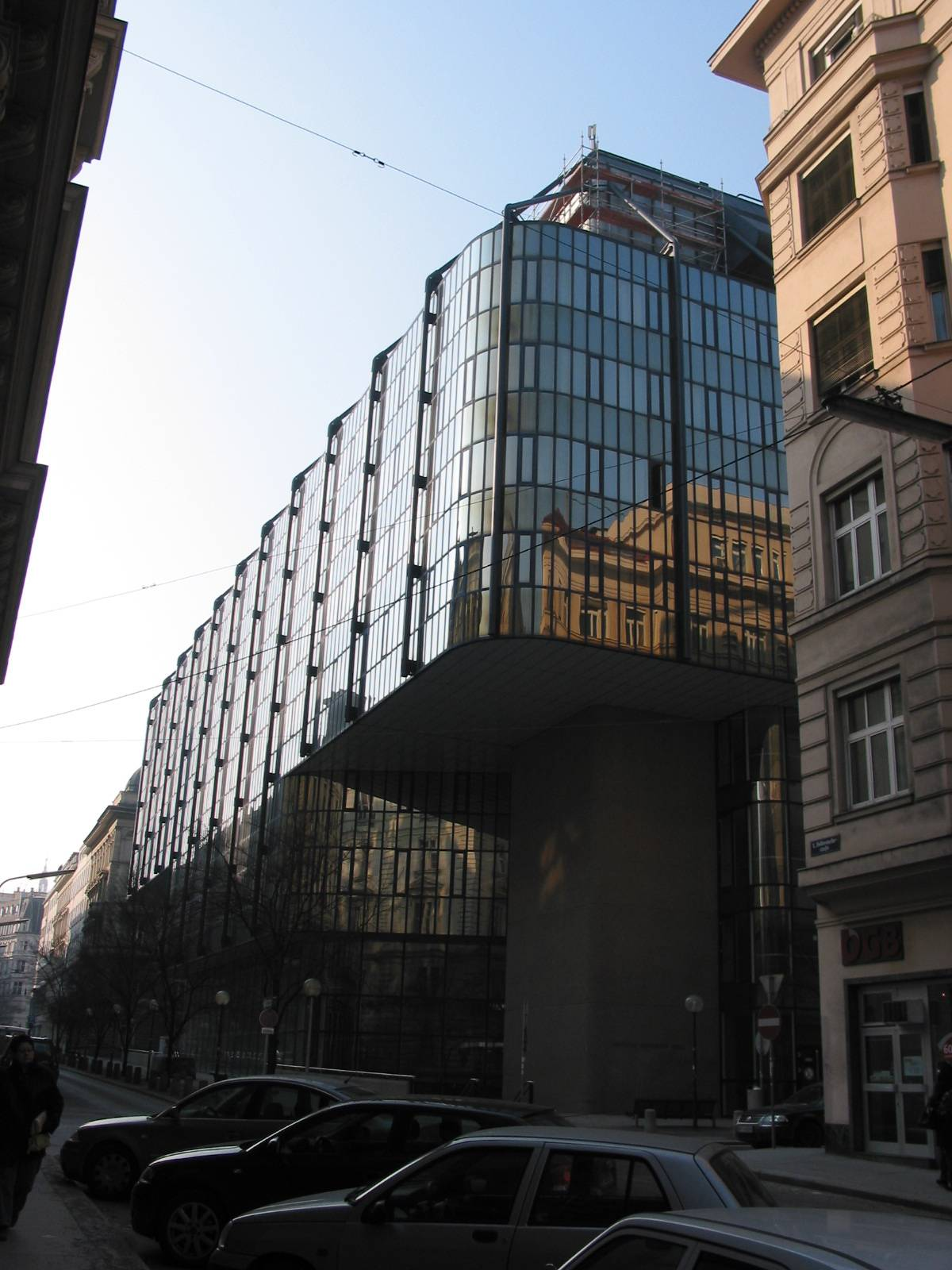 Juridicum, Vienna I, 2006-01-28 selfmade photo